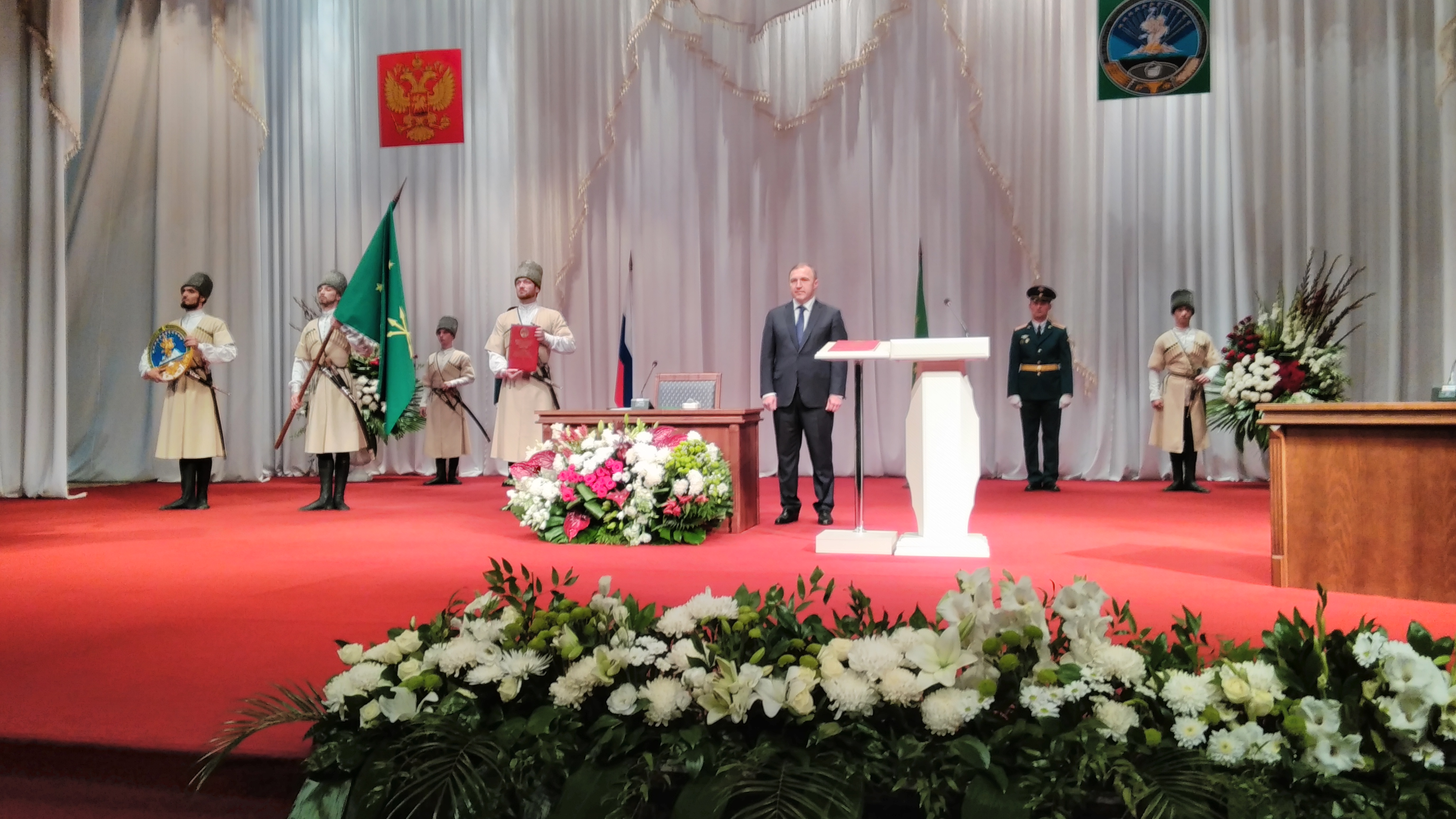 Кумпилов М. К. Инаугурация 10.09.2017 Майкоп